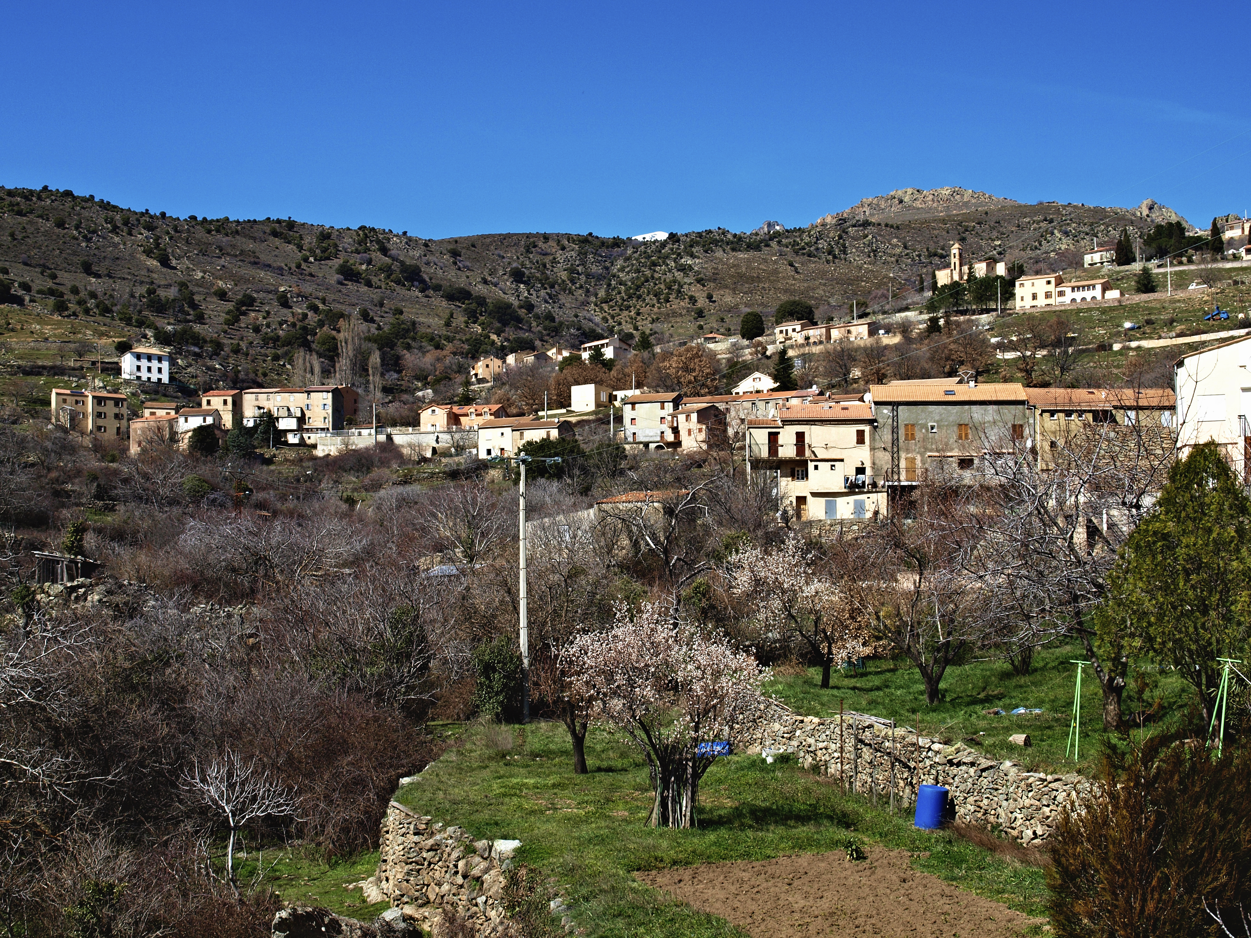 Corscia (Corsica) - Le village